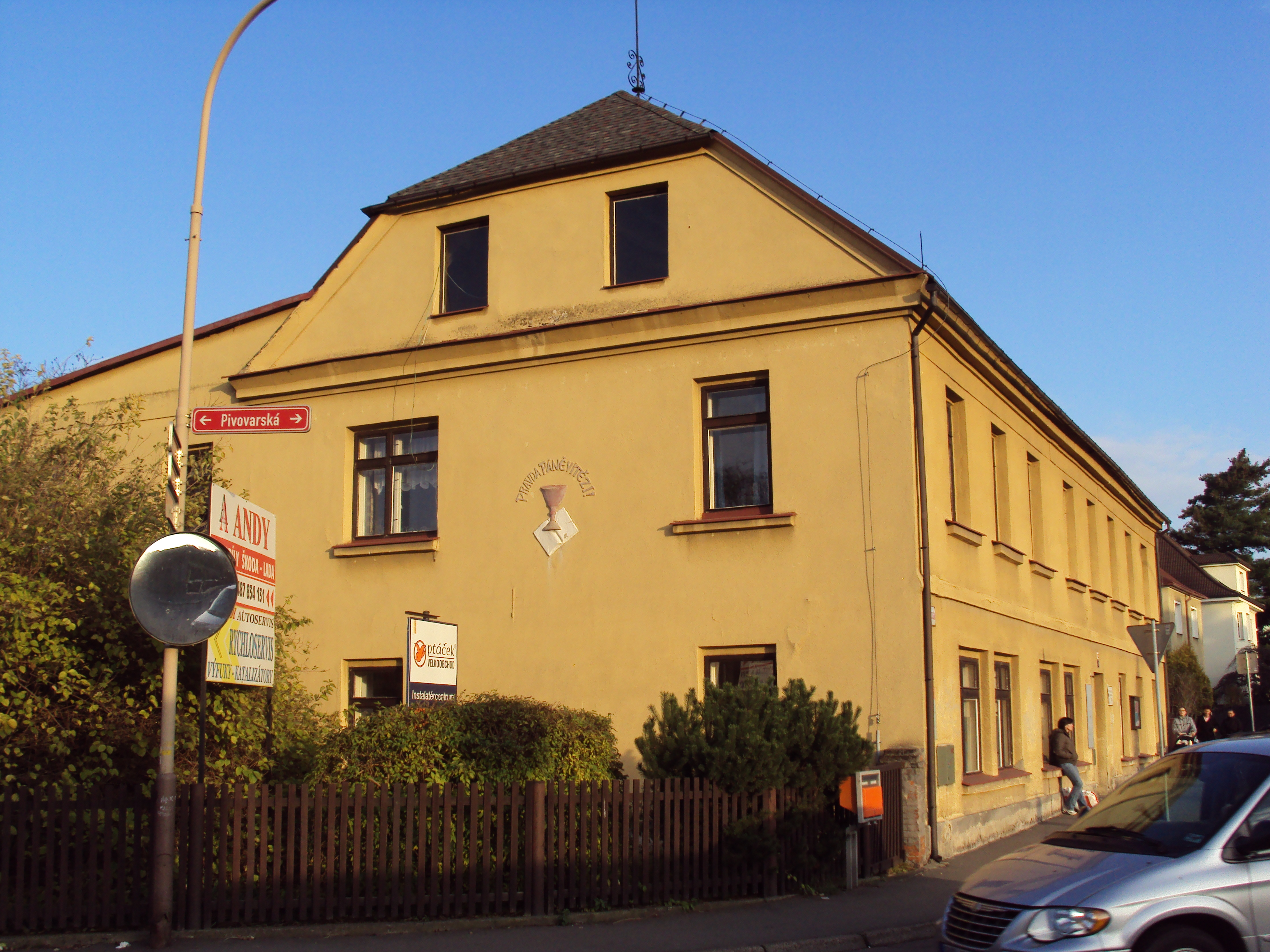 Farní sbor Českobratrské církve evangelické, ulice Pivovarská v České Lípě